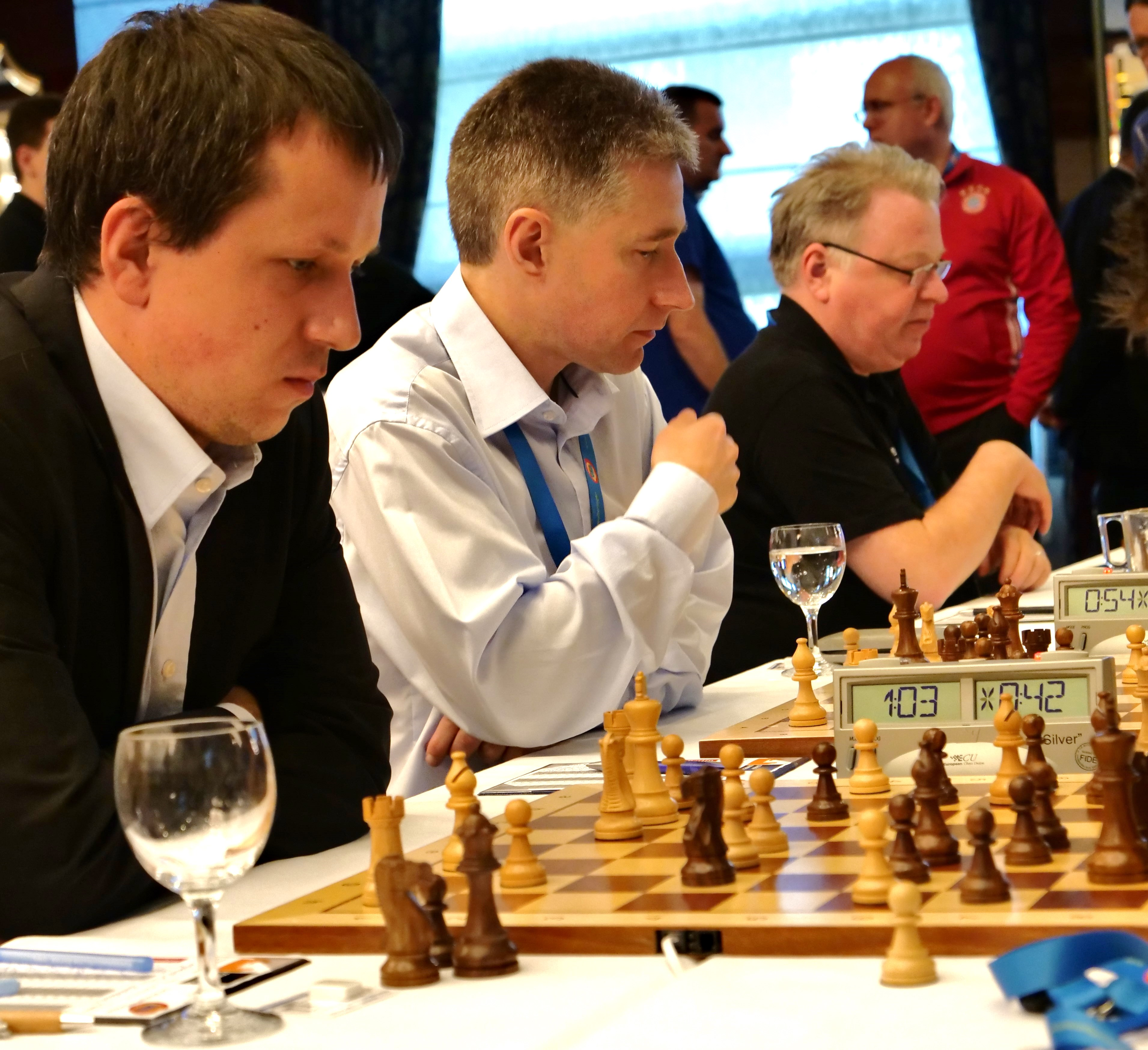 Wojtaszek, Adams und Hertneck in der Bundesliga-Endrunde 30-4-2018